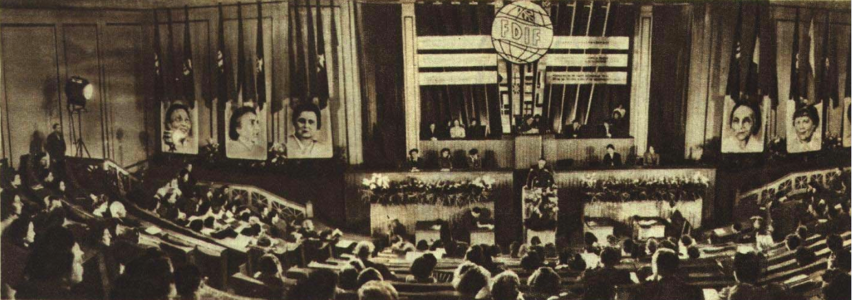 1951年1月31日国际民主妇女联合会第四届理事会-东德